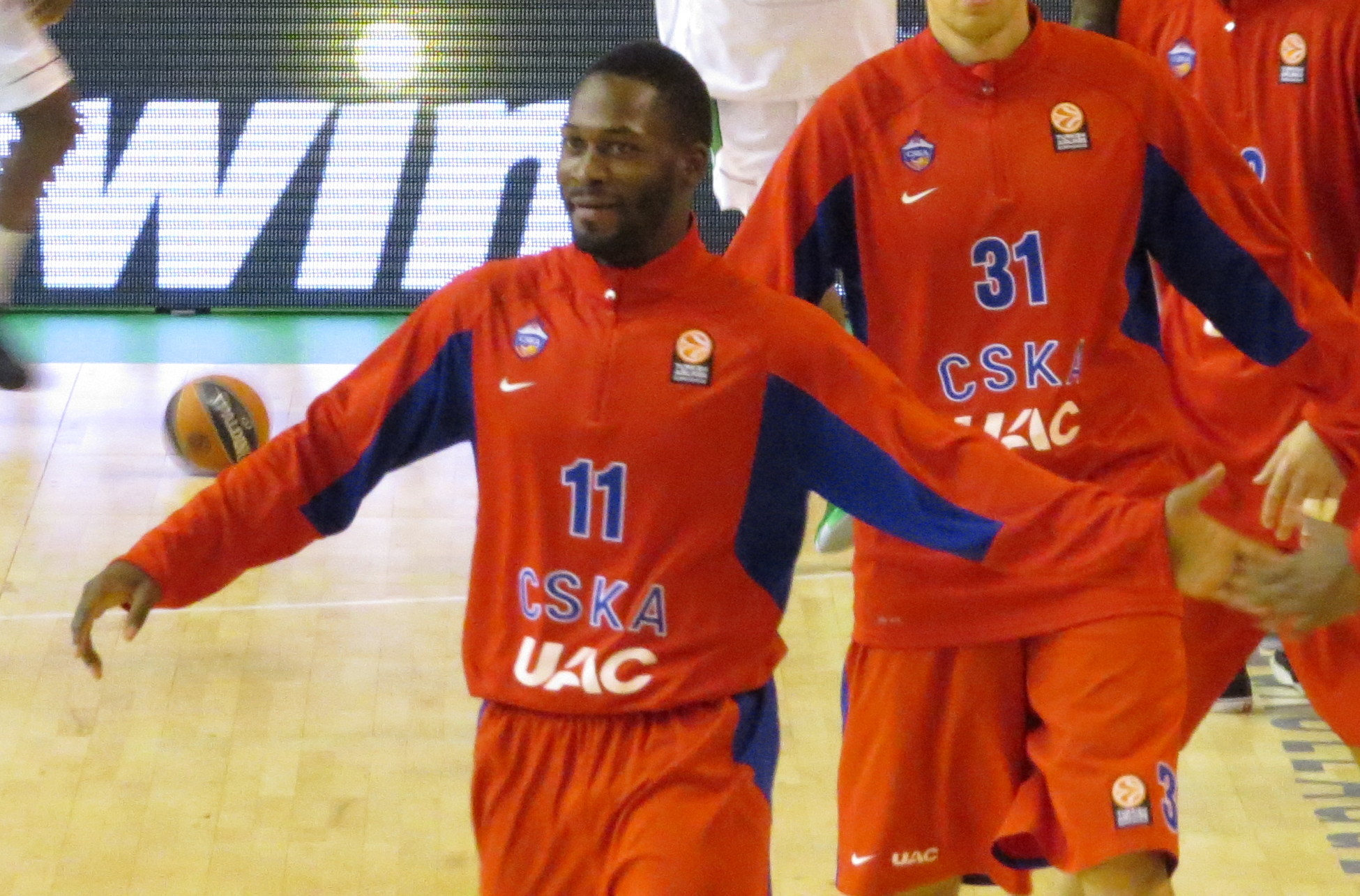 Match d'Euroligue entre Nanterre et le CSKA Moscou à la halle Carpentier (Paris). Victoire du CSKA 62-59.